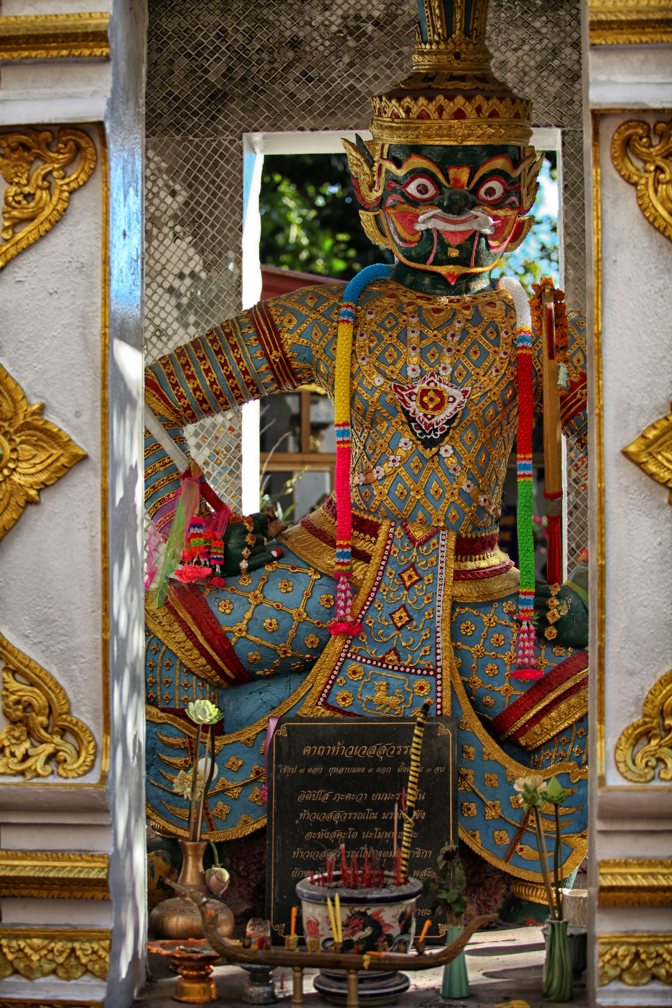 พระธาตุดอยสุเทพ